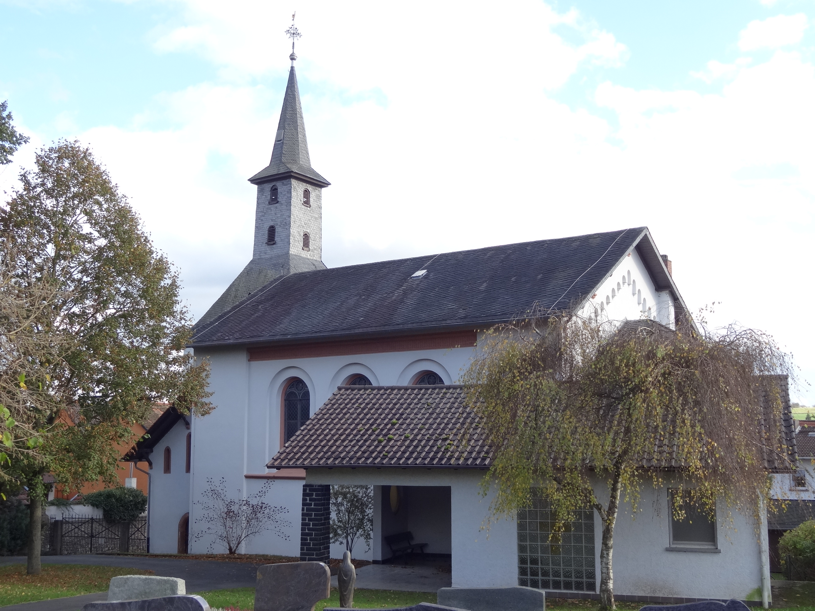 Evangelische Pfarrkirche Langd